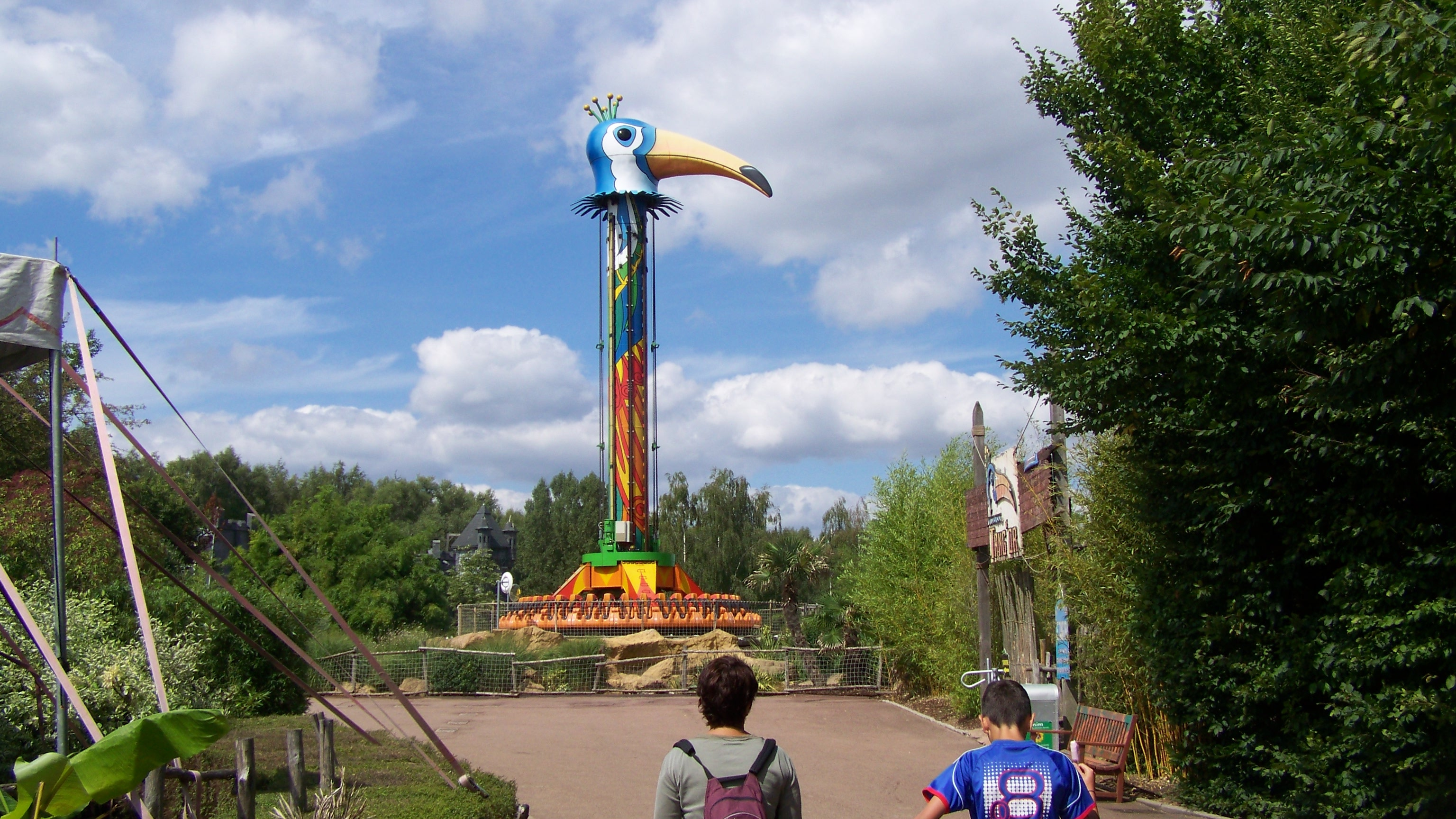 Toopel Tower a Walygator Parc en Lorraine